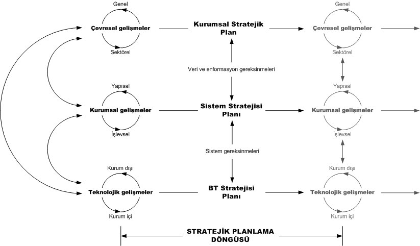 Kurumsal strateji, sistem stratejisi ve BT stratejisi ilişkisi